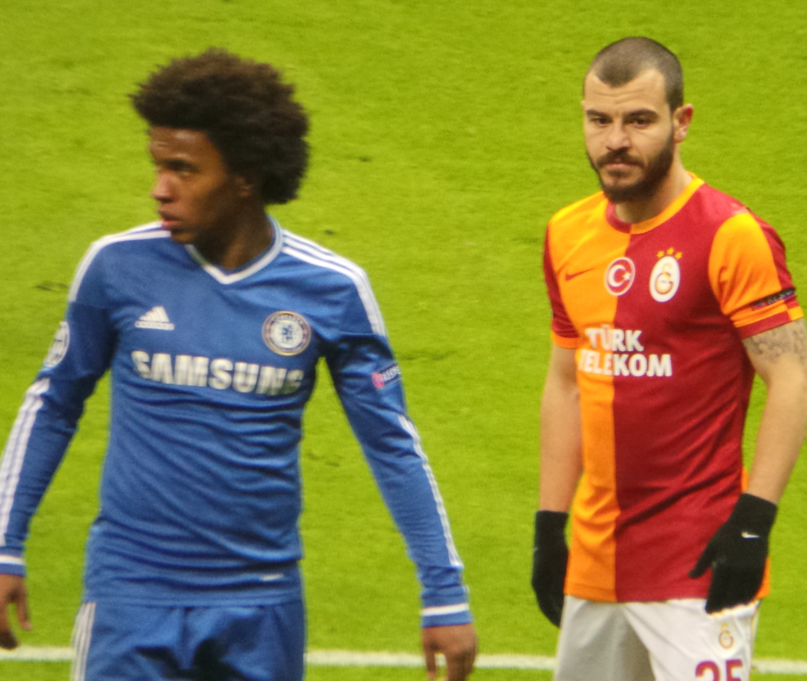 Willian ve Yekta